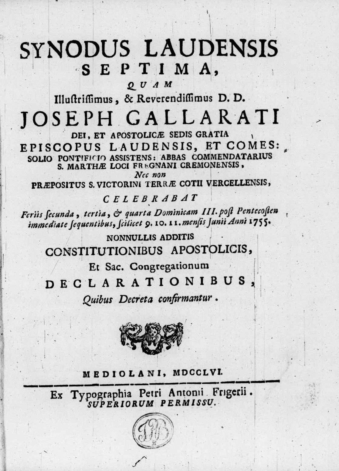 Frontespizio